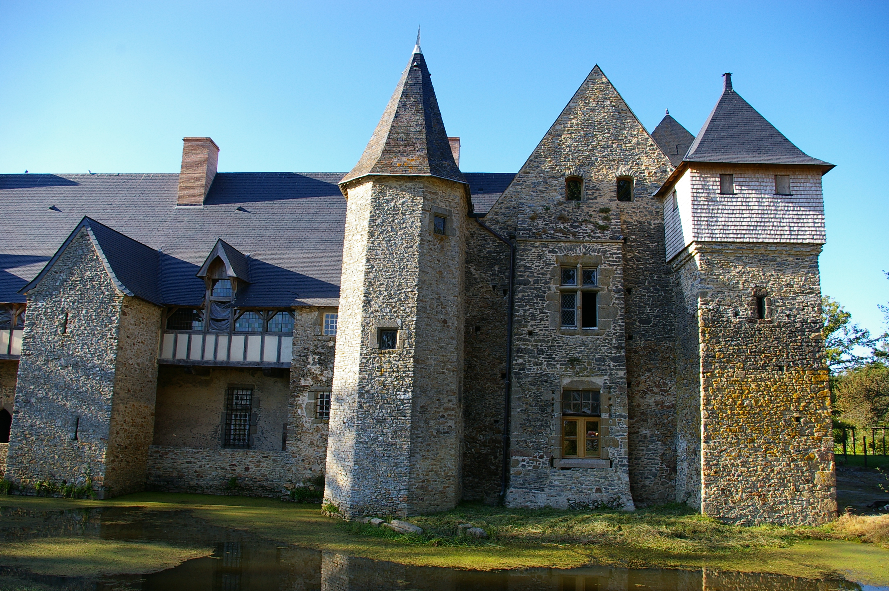 Rückseite des Schlosses la Grande Courbe de Brée